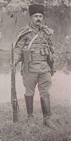 Արմենակ Եկարյան